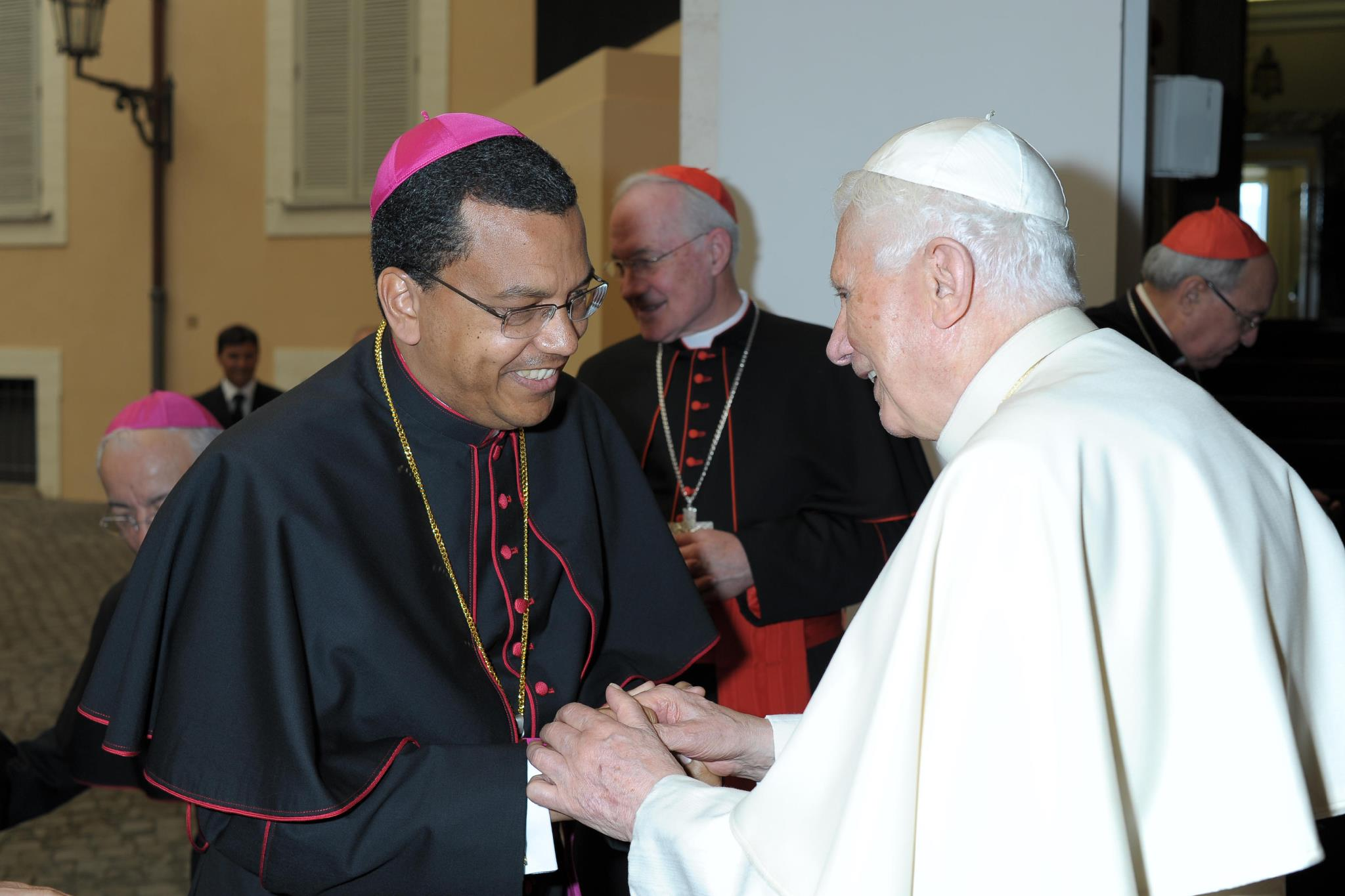 O bispo auxiliar da Arquidiocese de Salvador D. Gilson Andrade da Silva